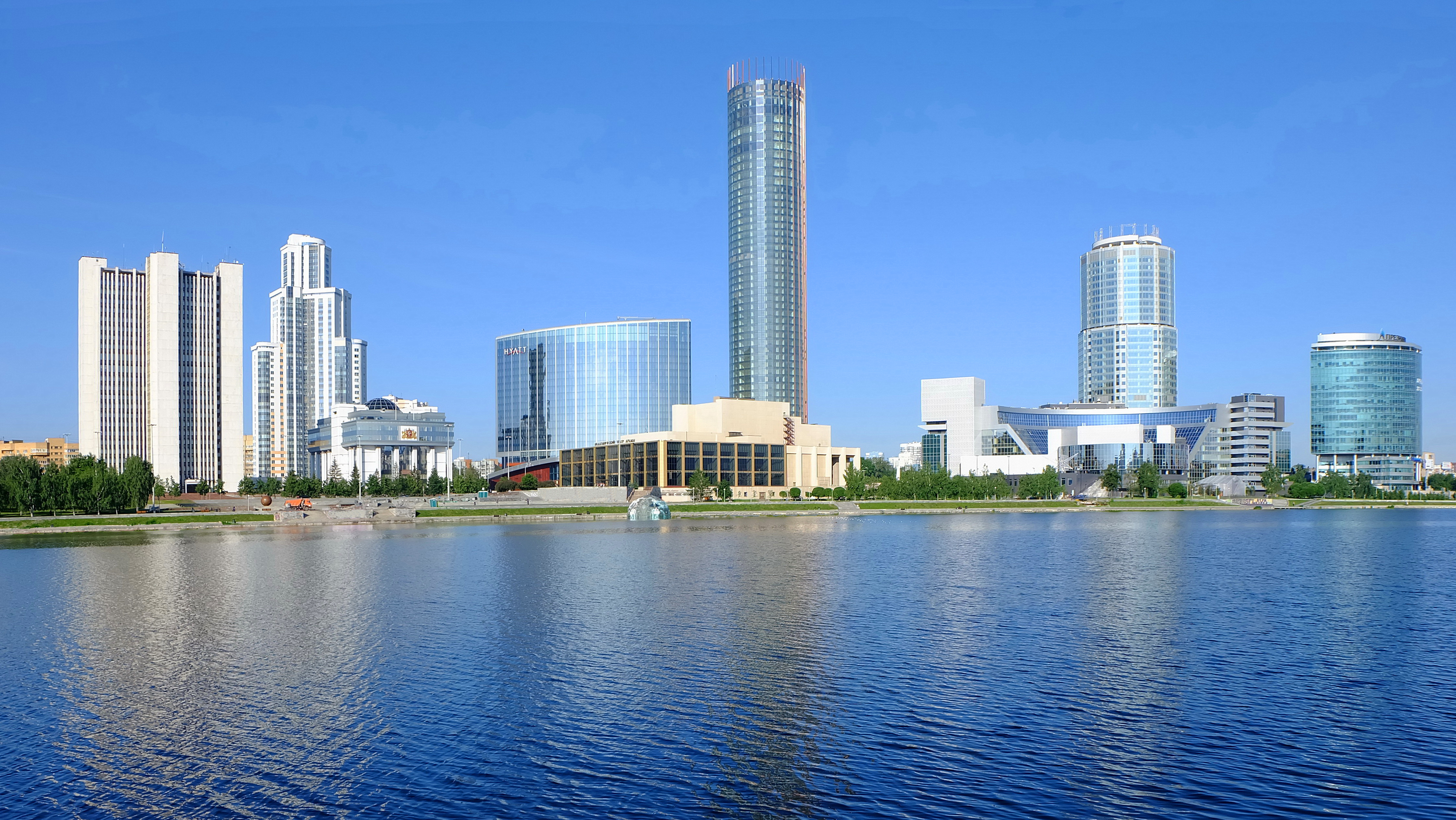 Набережная Городского пруда в Екатеринбурге (правый берег). Слева направо: Дом Правительства Свердловской области (1978-1982), Жилая высотка "Февральская революция" (2010), Здание Законодательного собрания Свердловской области (2009), Отель Hyatt (2008), Свердловский драмтеатр (1990), Башня "Исеть" (2016), Ельцин-центр (2015) и деловой дом "Демидов" (2016), бизнес-центр "Президент" (2011).